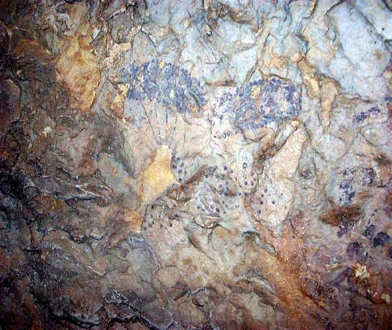 Pintures de la Sarga (Alcoi), abric I, panell 3: dos arbres amb dos pals que batent les copes i amb fruits caiguts al terra (art llevantí).